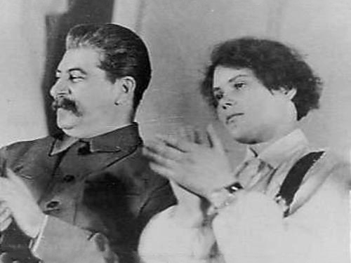 Stalin en de 23 jaar oude Maria Demchanko